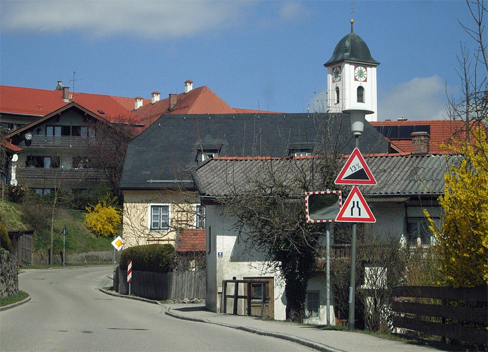 Rott am Inn, Dorfeingang